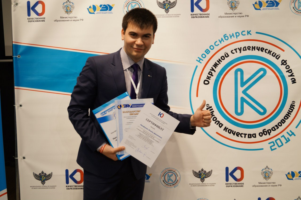 Окружной студенческий форум "Школа качества образования"